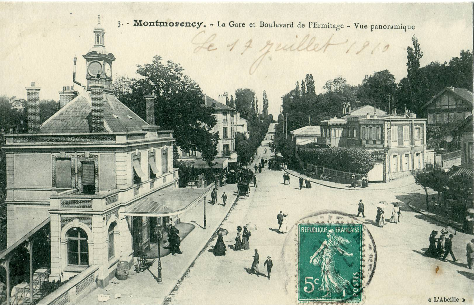 Carte postale ancienne éditée par Abeille N° 3MONTMORENCY La Gare (du Refoulons) et le Boulevard de l'Hermitage